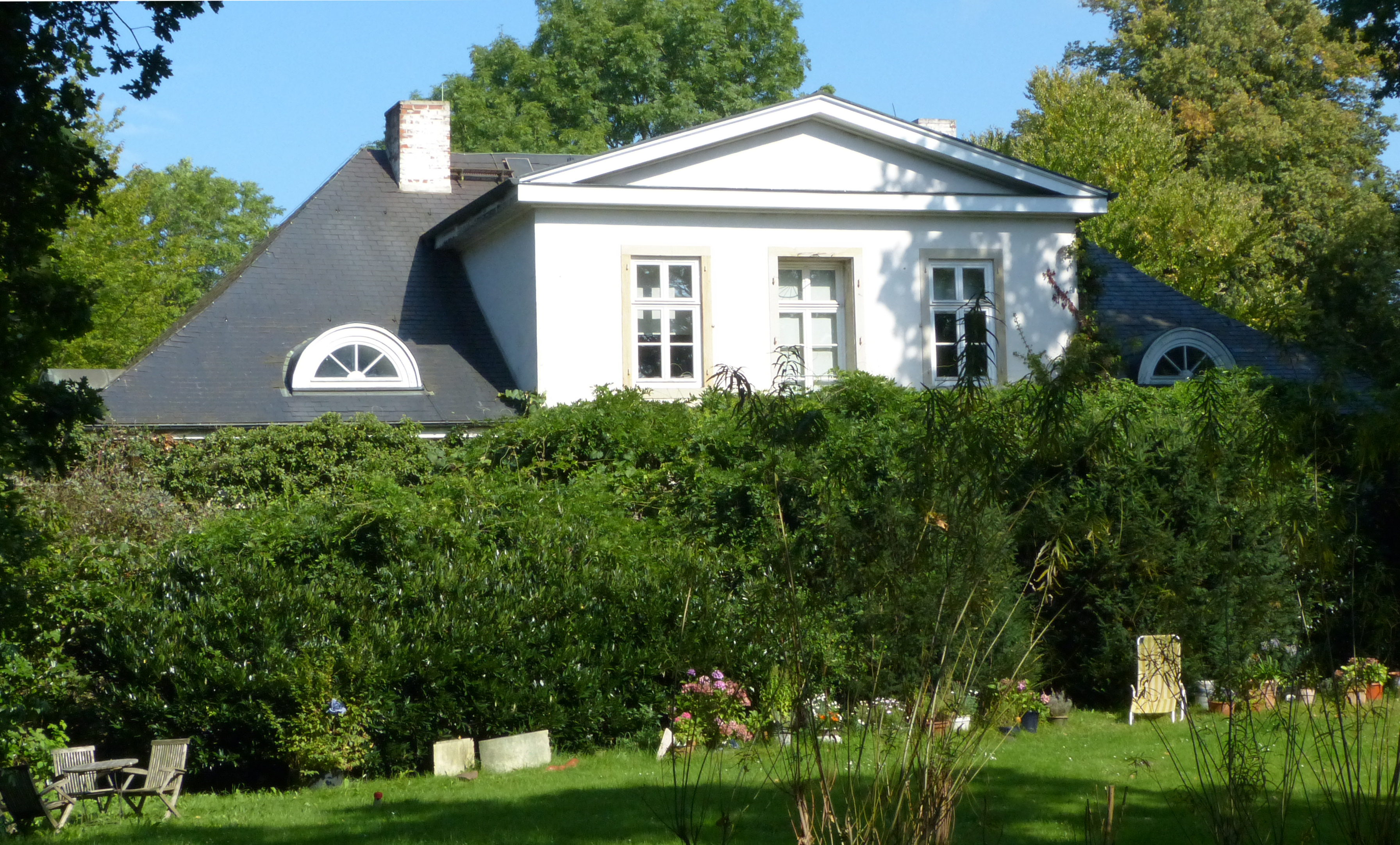 Heinrichsburg, Haus Lesmona in Bremen, Am Kapellenberg 5Das abgebildete Objekt ist ein geschütztes Kulturdenkmal in der Freien Hansestadt Bremen, mit der Nr. 1249 beim Landesamt für Denkmalpflege registriert.